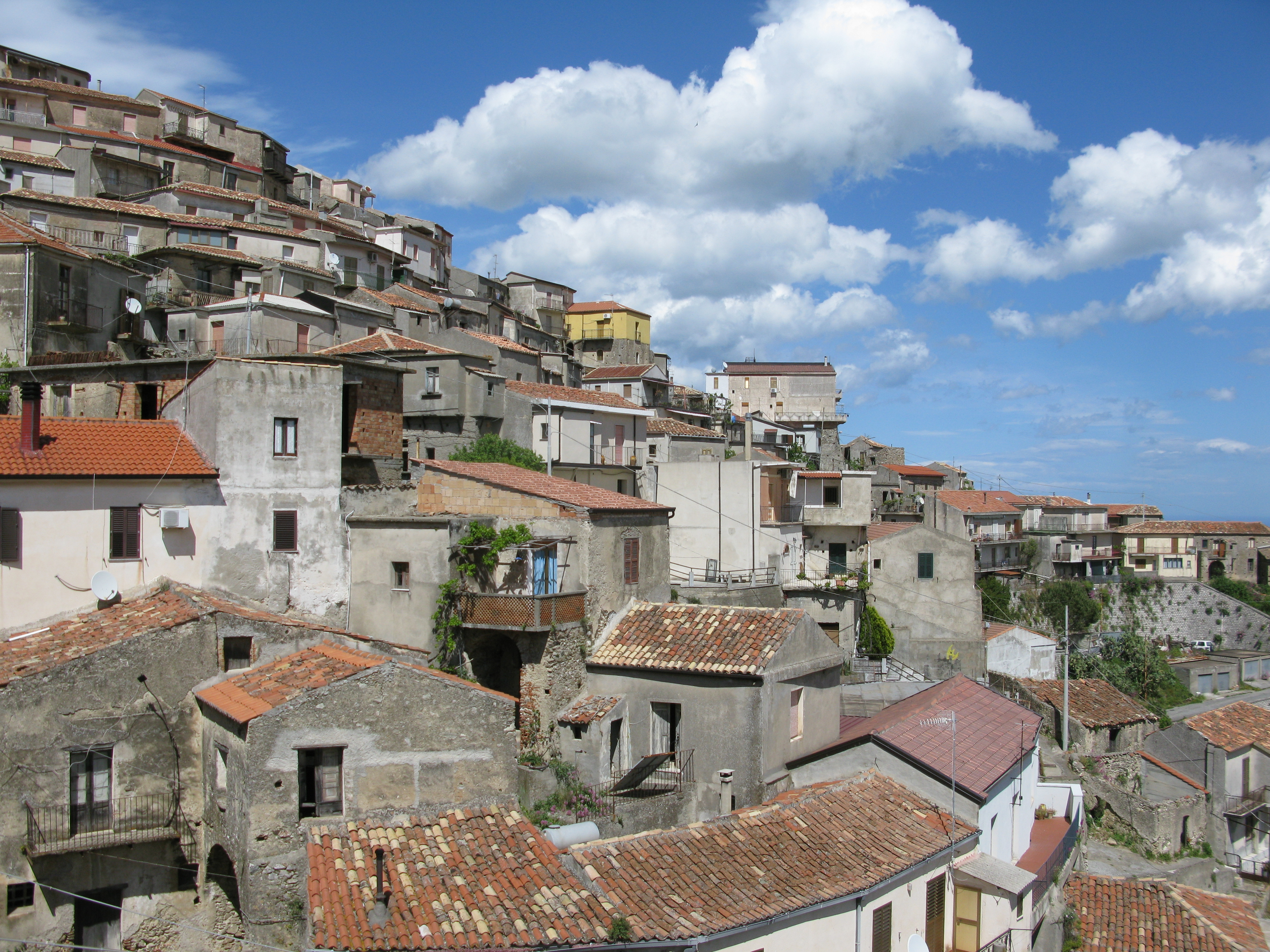 Staiti